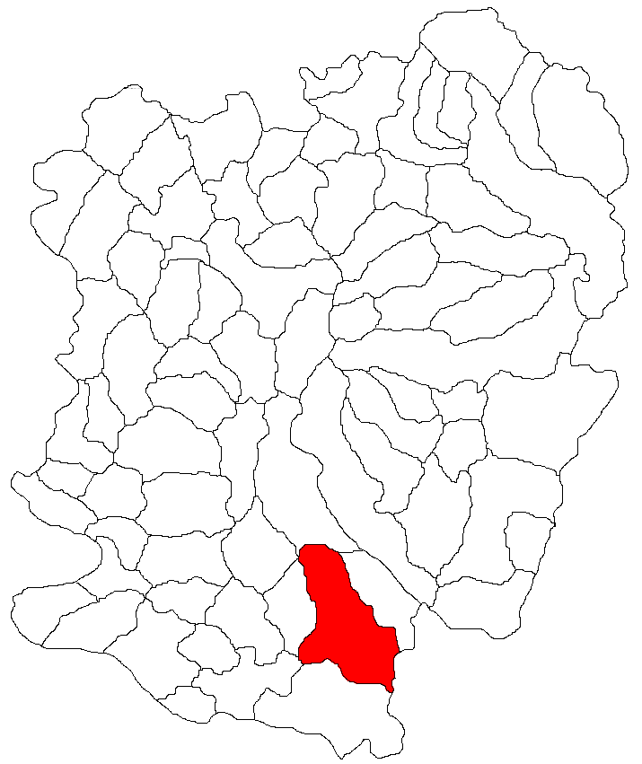 Categorie:Hărţi ale judeţului Caraş-Severin